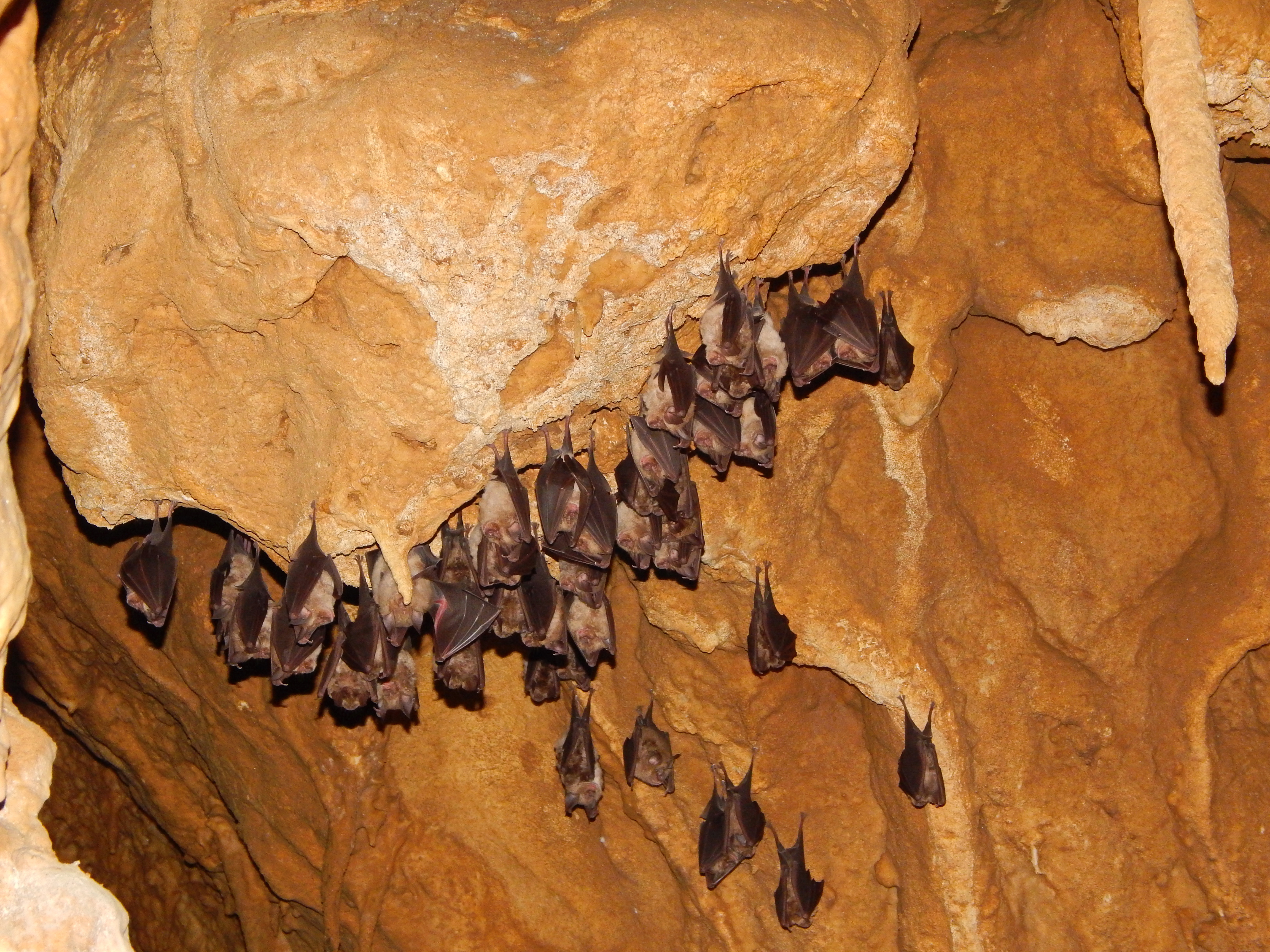 Srpski (latinica): {ПИО09} Slepi misevi u Resavskoj pecini.